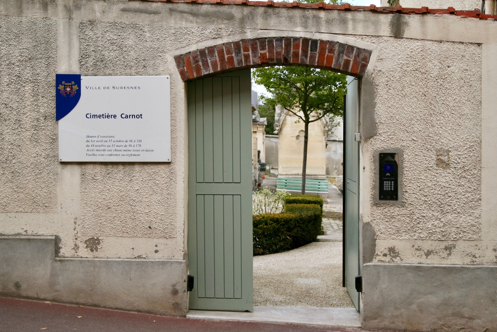 Entrée du cimetiere Carnot à Suresnes